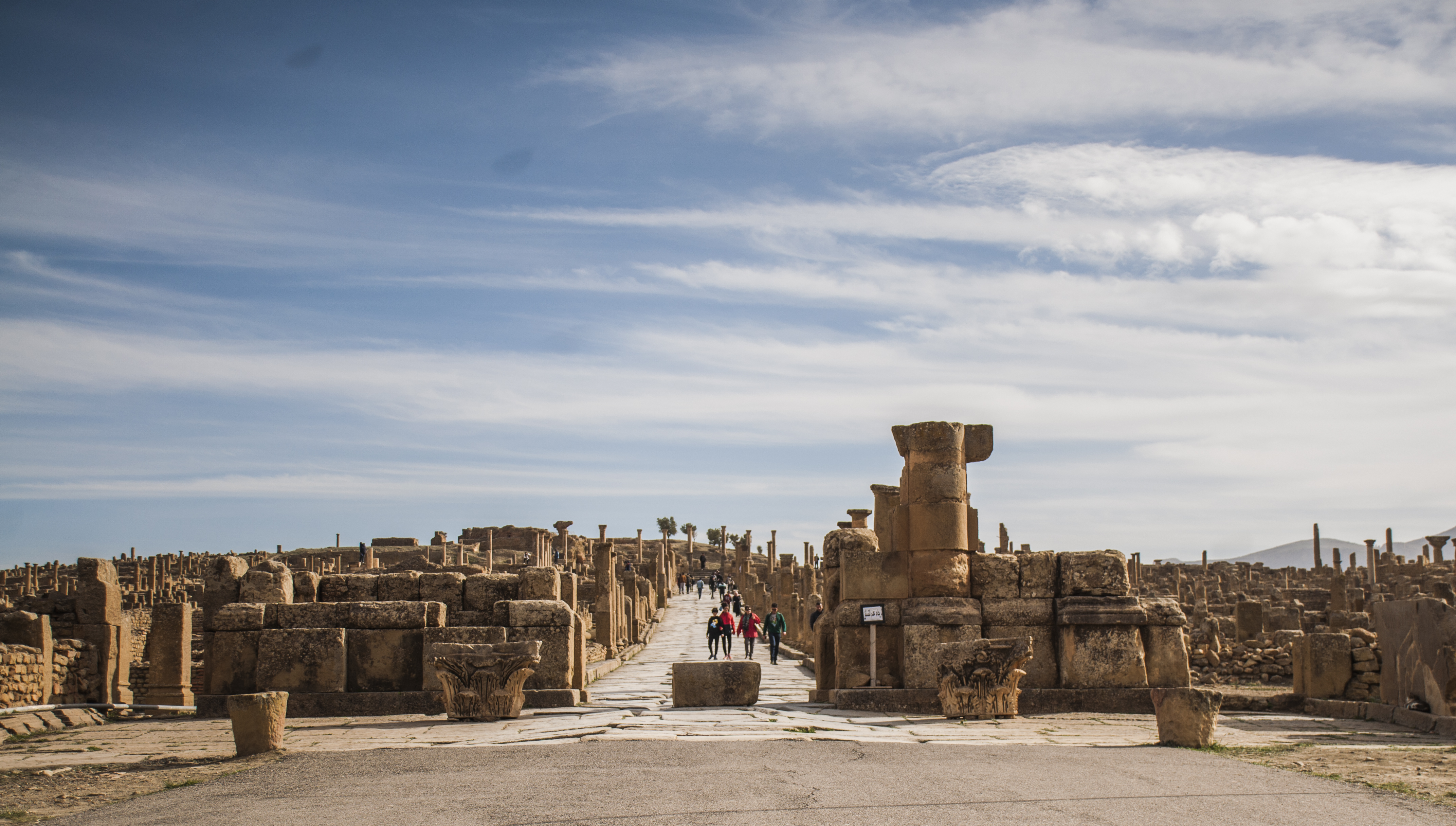 تمقاد مدينة تاريخية تقع بباتنة